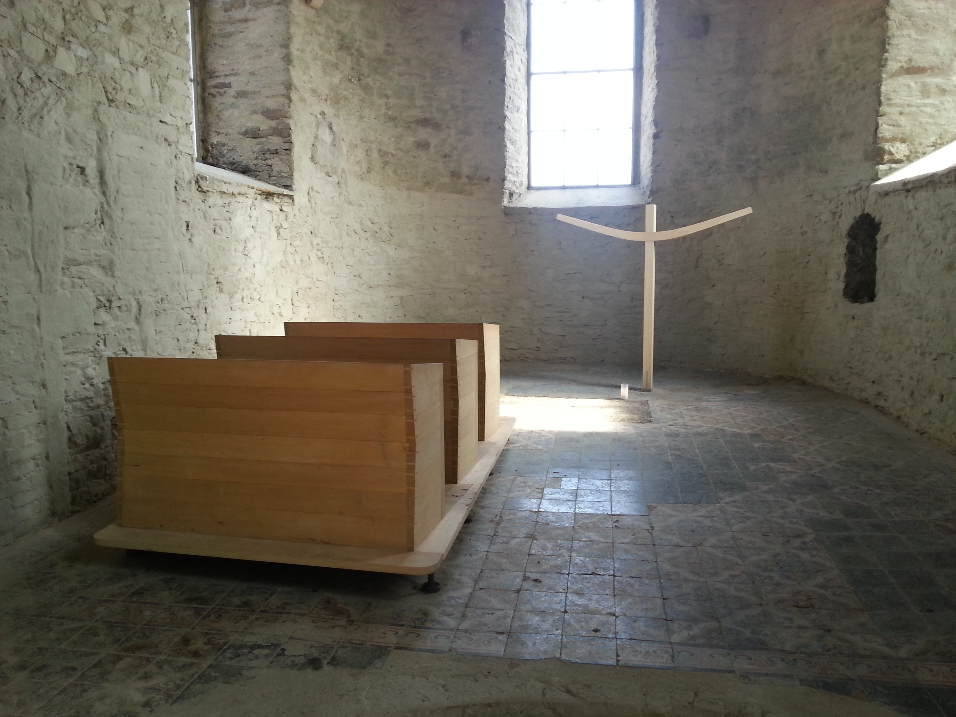 Gestühl und Kreuz in der Dorfkirche St. Rochus in Wollseifen.